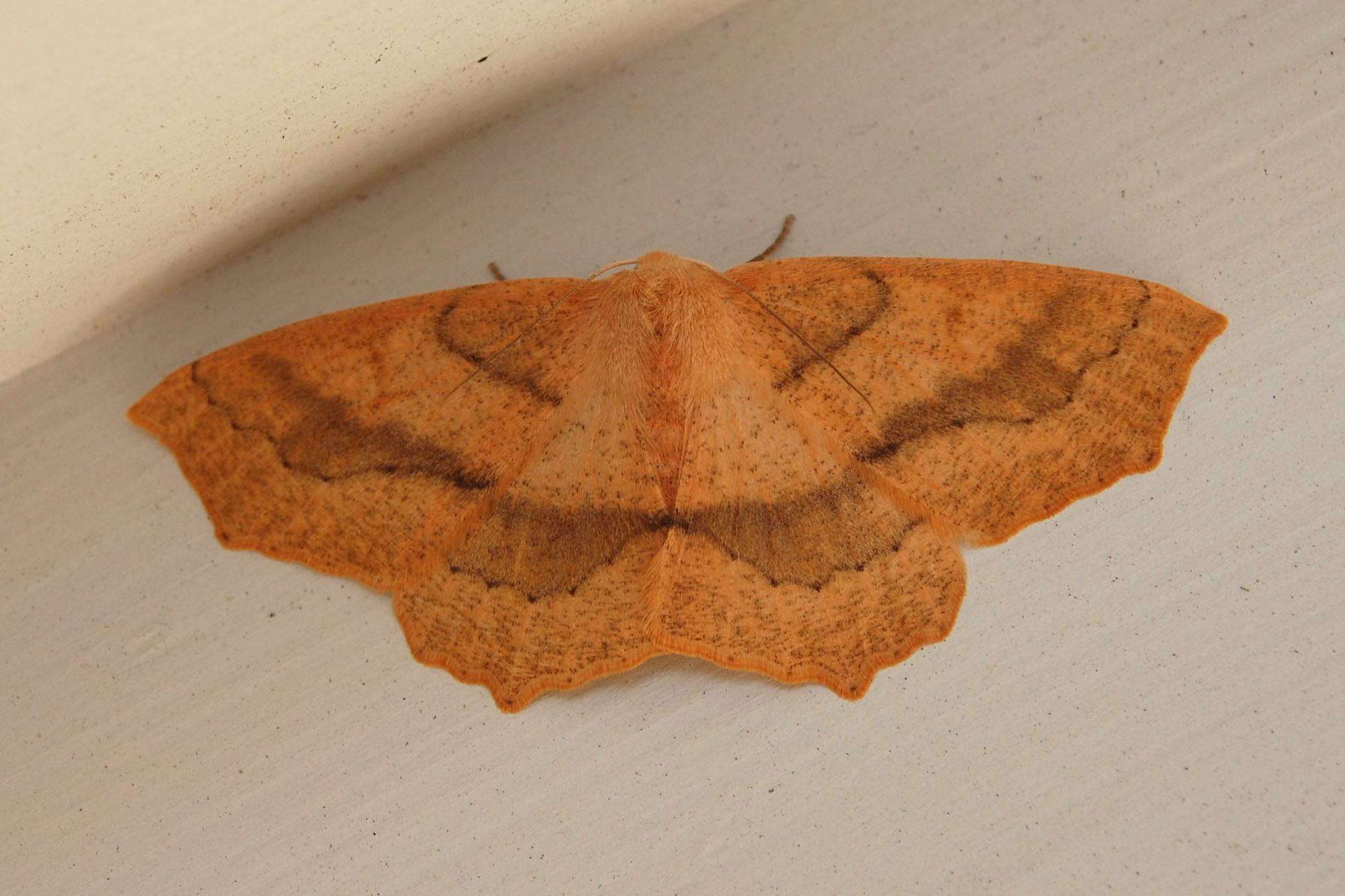 Sabulodes aegrotata Made in San Jose, California. Identified by Bob Patterson